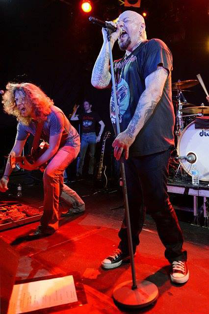 Steph Honde et Paul Di'Anno live en 2010